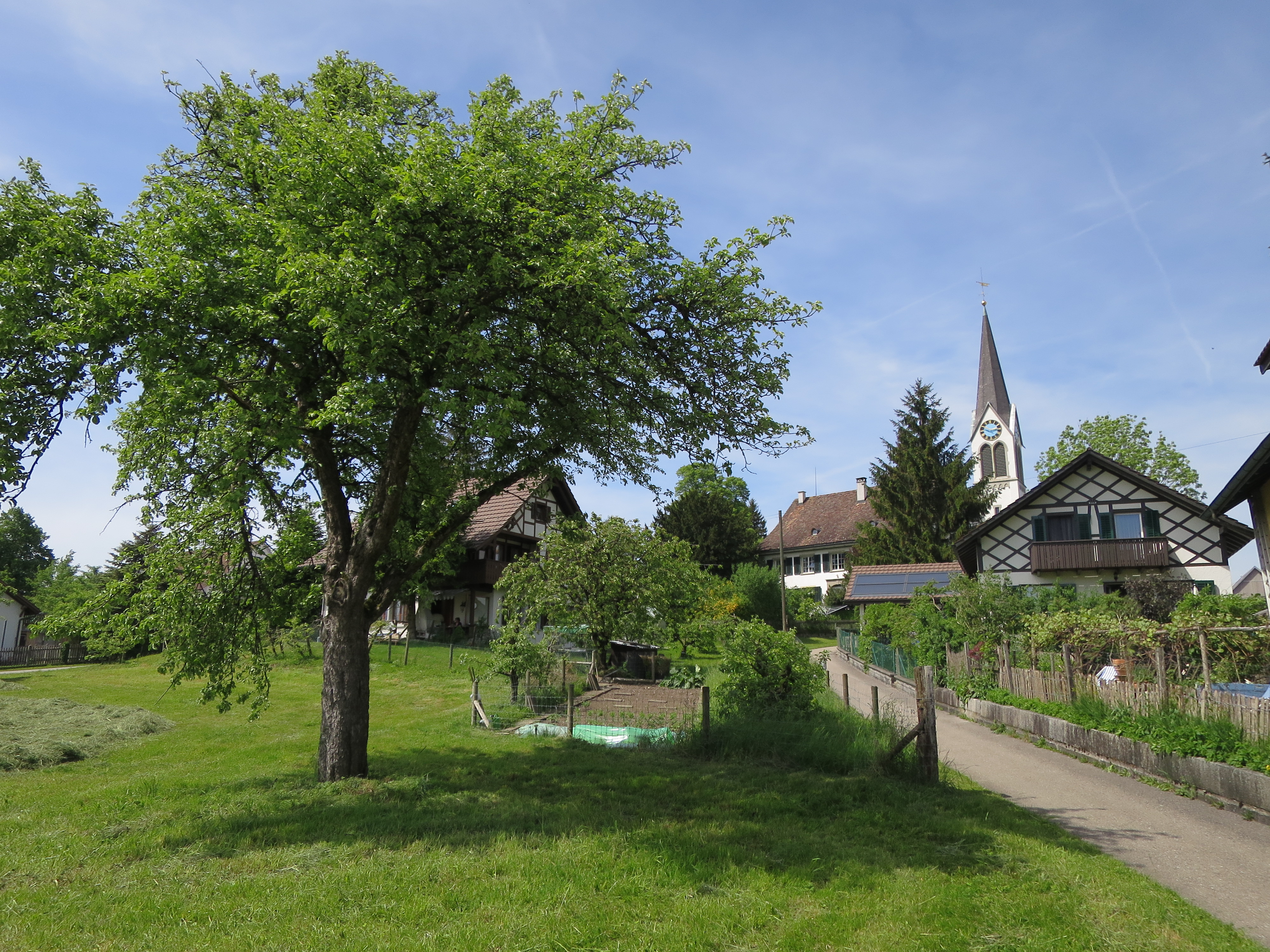 Lindau ZH: Ortskern